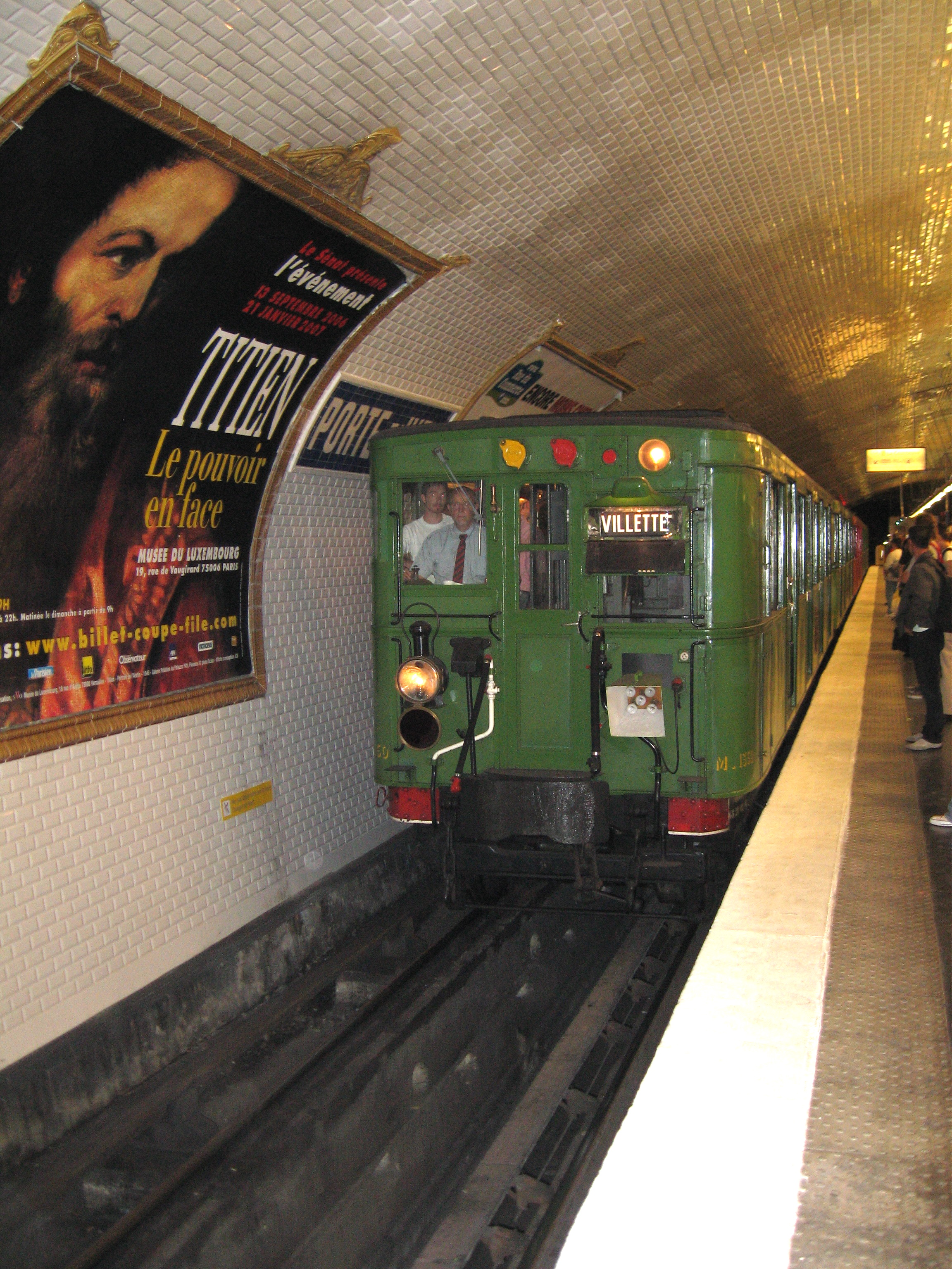 Journées du patrimoine RATP 16-17/09/2006. Sprague-Thomson (1907).